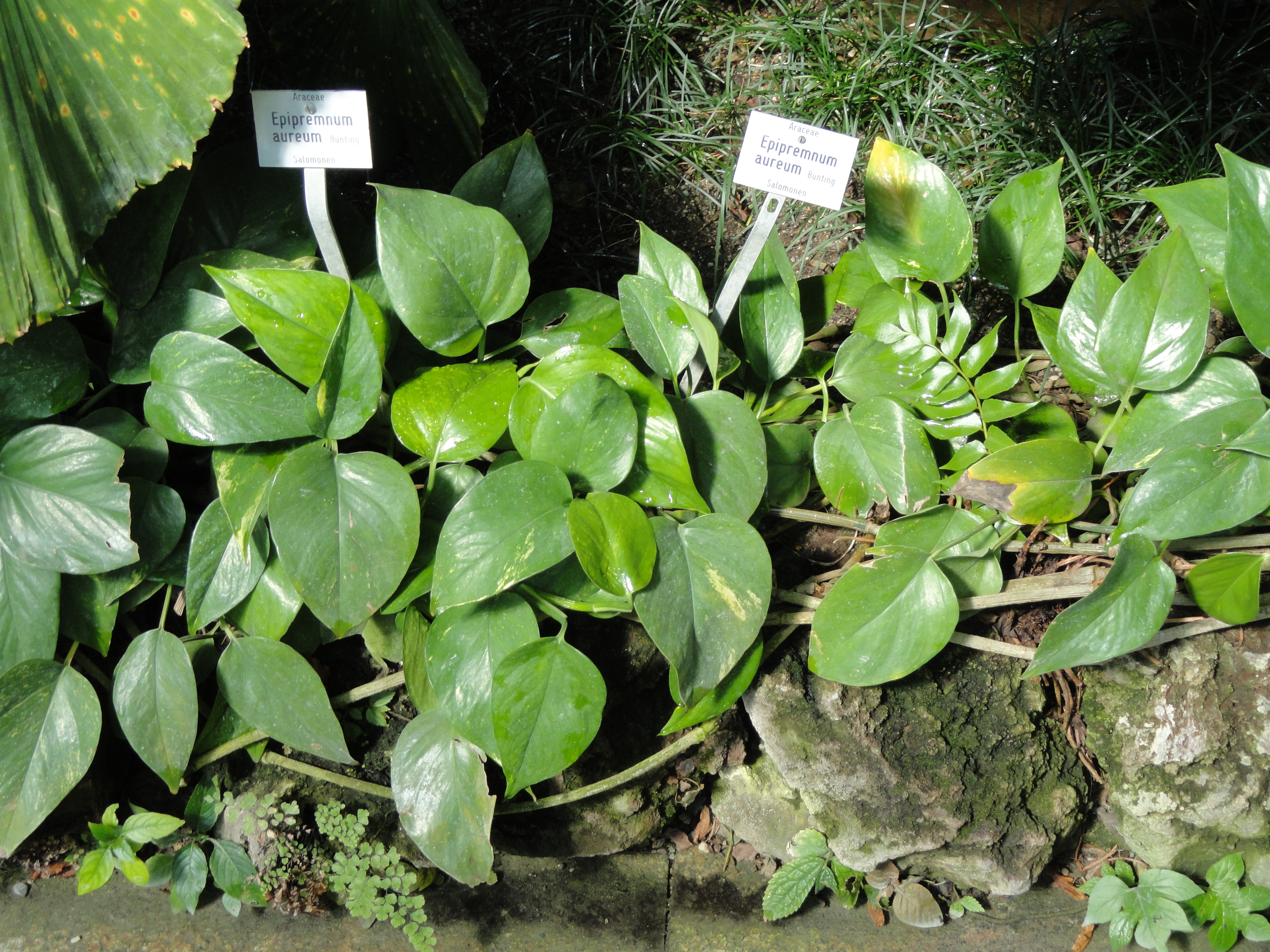 Epipremnum aureum specimen in the Botanischer Garten München-Nymphenburg, Munich, Germany.